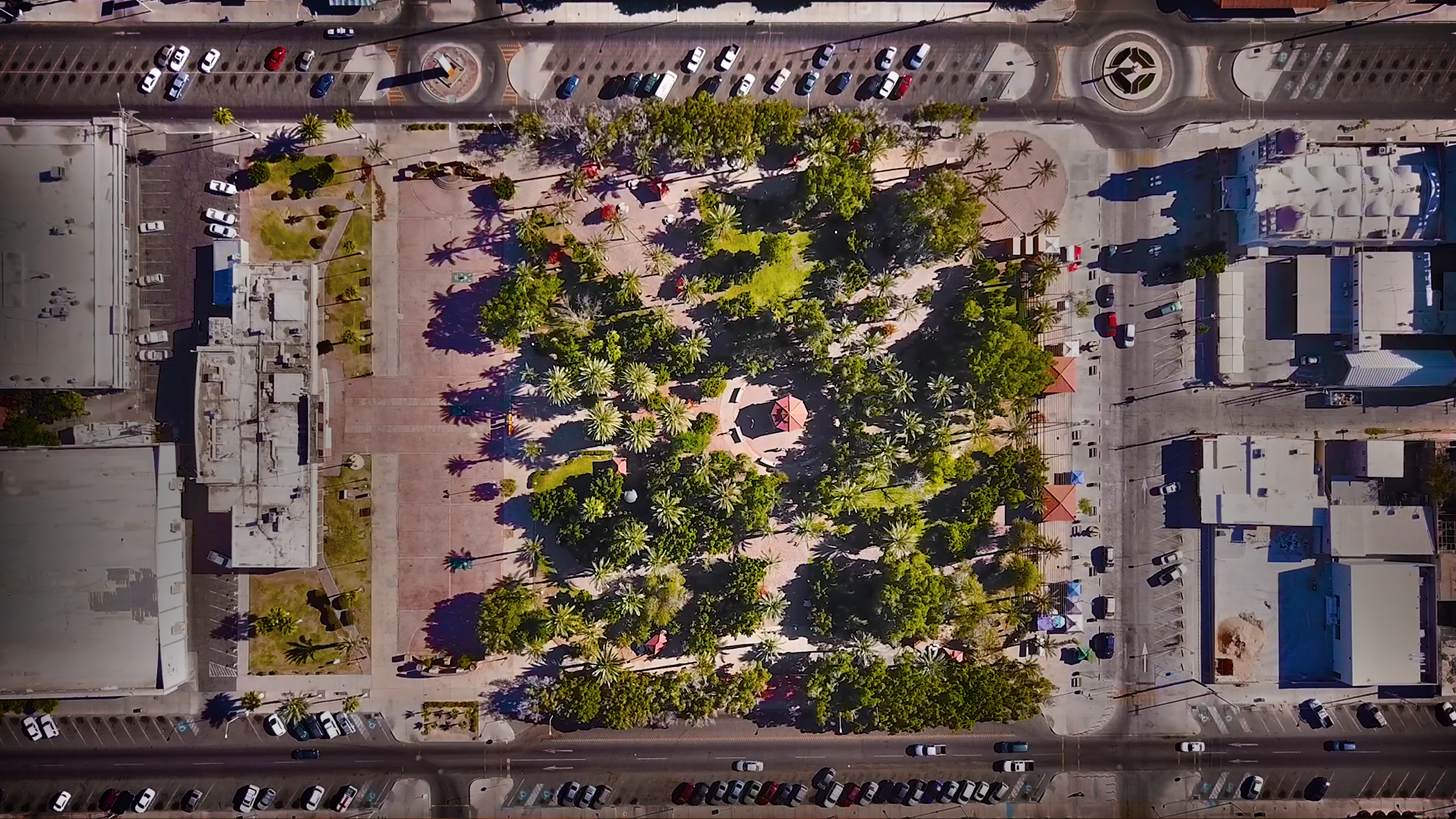 Imagen captada sobre el parque Benito Juárez